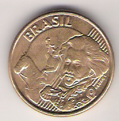 Verso da moeda de 10 centavos da segunda geração. This graphic was created with GIMP.